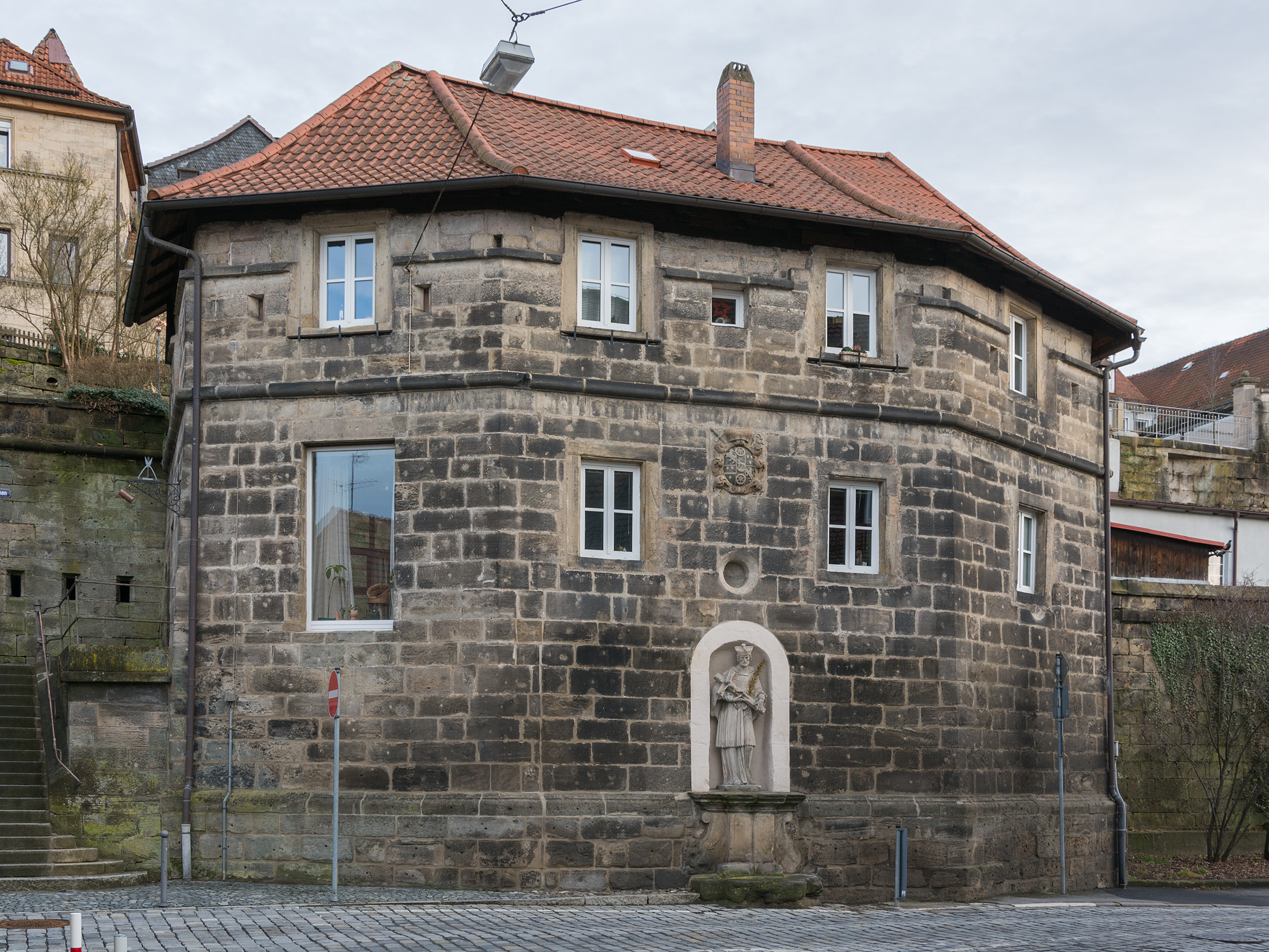 Das Gebäude "Am Pförtchen 5" in Kronach, ehemalige Neue Büttelei oder Fronfeste, Bestandteil der ehemaligen Stadtbefestigung, heute Wohnhaus